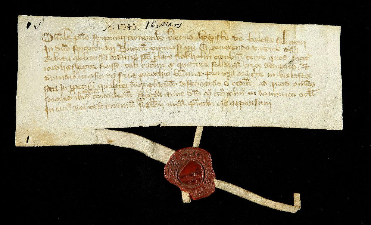 Bo Höviske i Bällsta bortbyter 4 örtugland 3½ penningland i Asunda (nu Ålsten) i Bromma socken till abbedissan Rikissa i S:ta Klara kloster i Stockholm, mot ett öresland i Bällsta. Utfärdaren beseglar. Utfärandedatum: Den 16 mars 1343. Pergamentsbrev. Sigillet (skölden delad på sned från höger; i nedra delen böljor) på en ur brefvet klippt remsa.